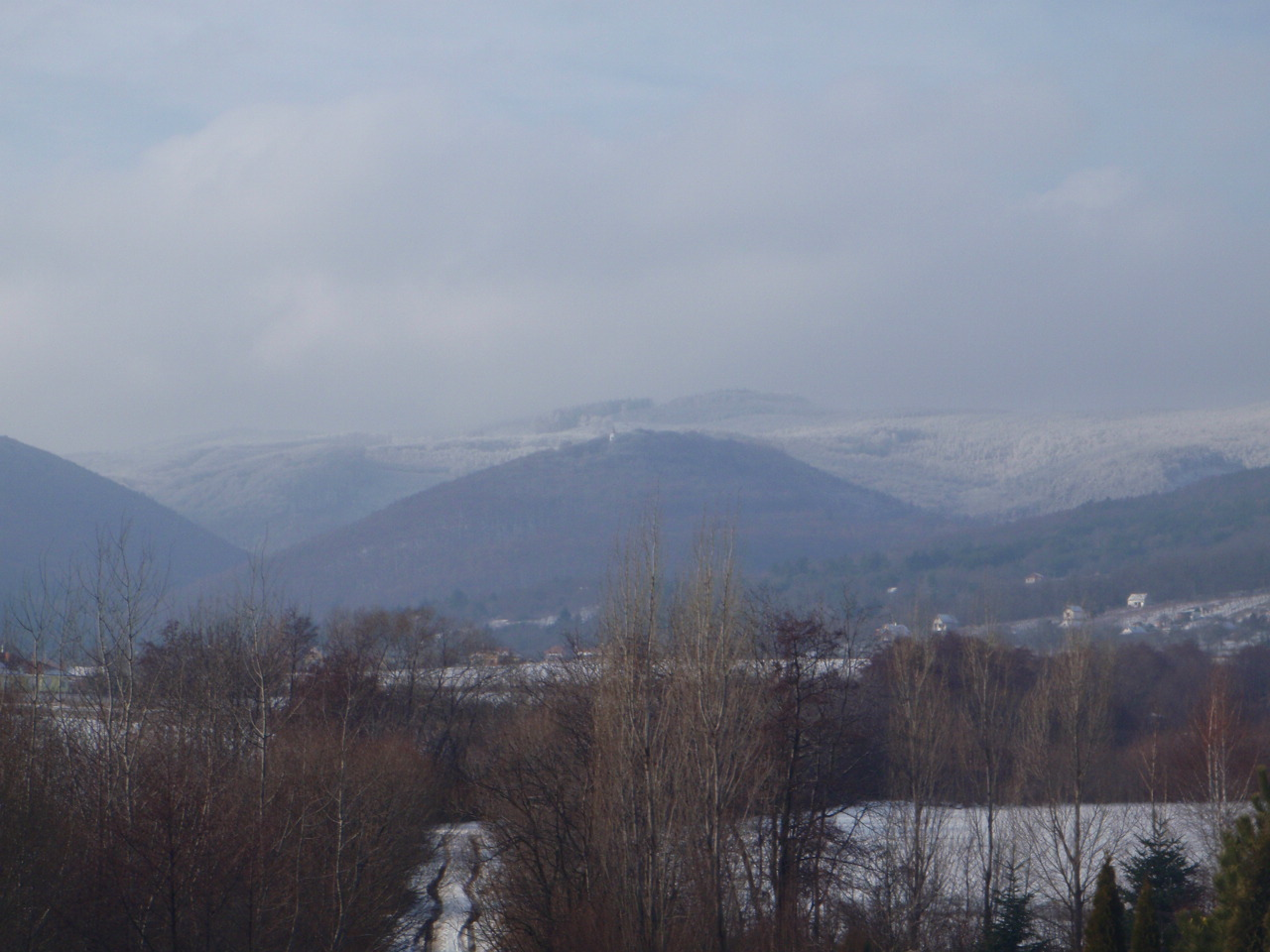 Günser Gebirge bei Velem